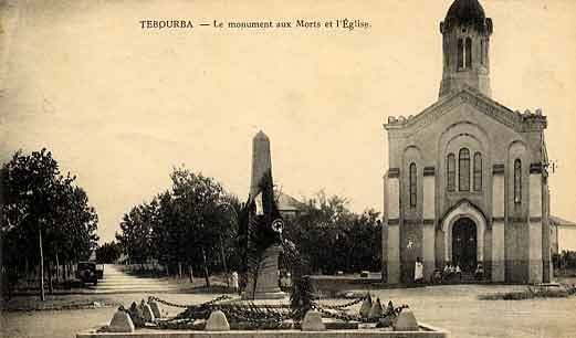 Tebourba (Tunisie) - L'église et le monument aux morts 14-18